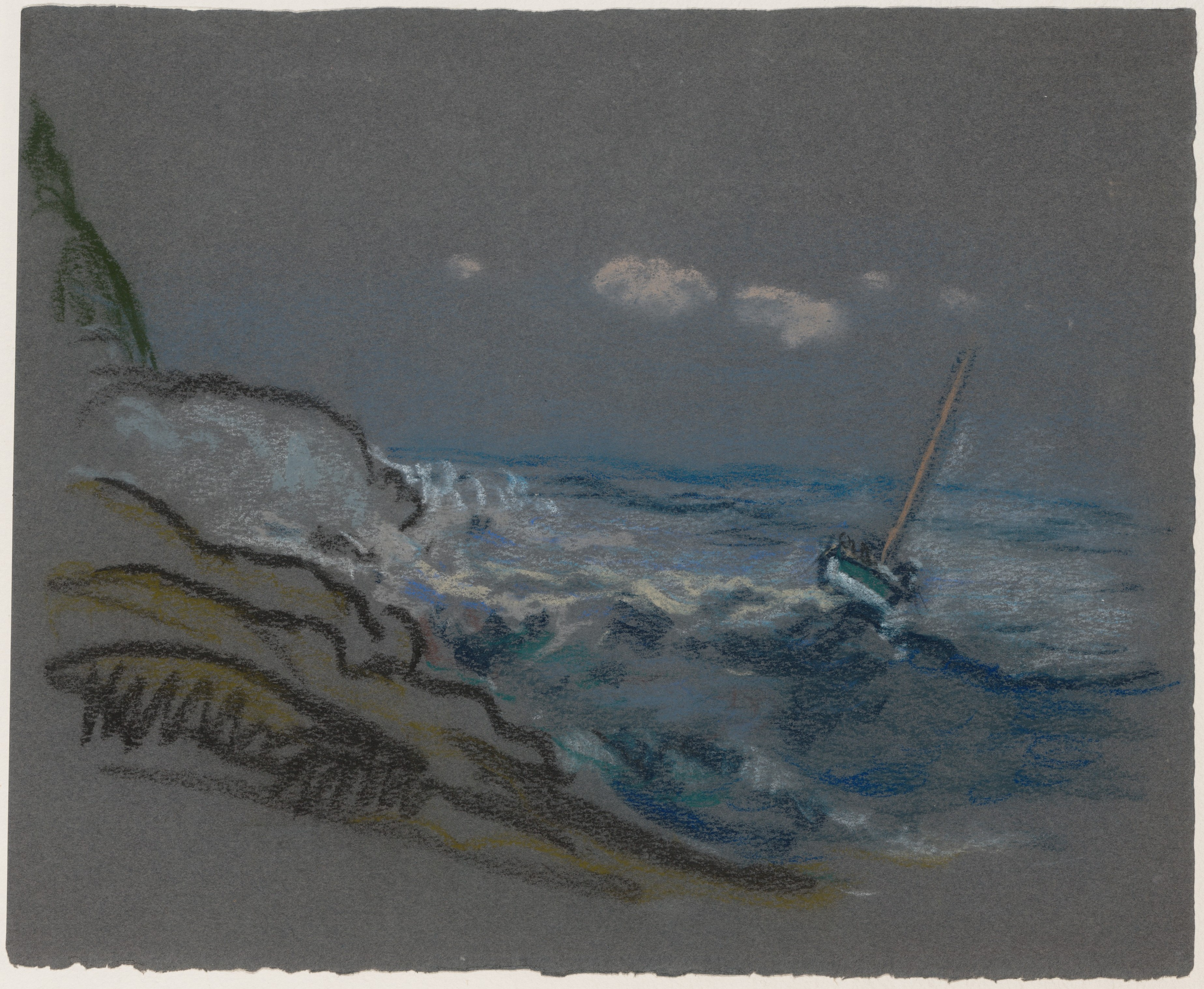 Drawing; Drawings